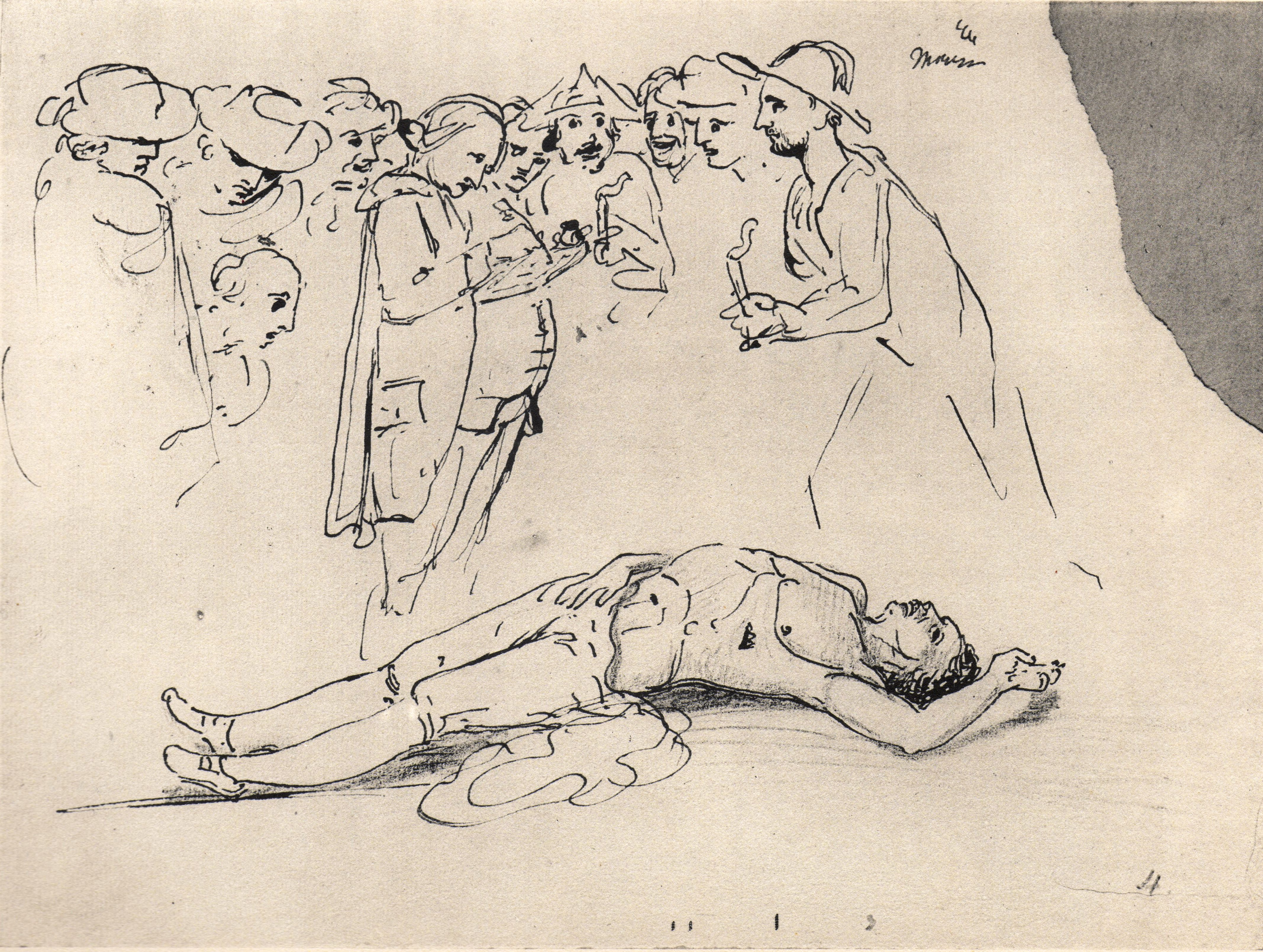 Scan aus Schriften der Goethe-Gesellschaft 25, Blatt 9